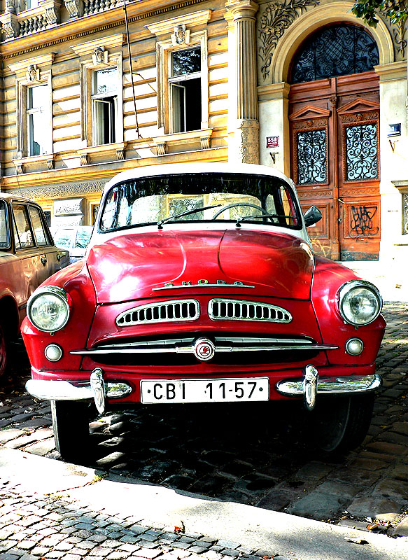 Škoda 440 SpartakPraga/Prague/Praha